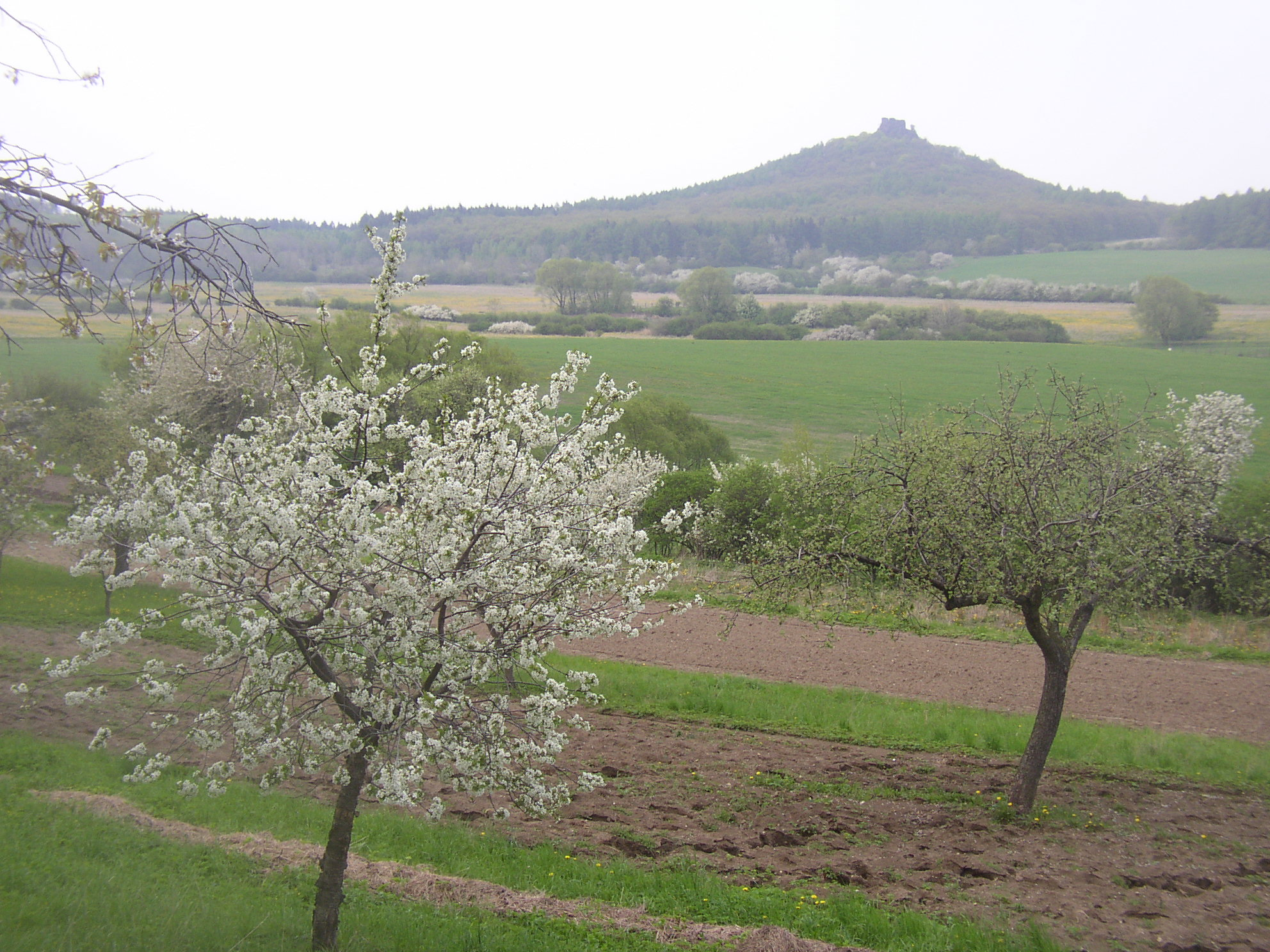 Hrad Oltářík (Hrádek) na stejnojmenném vrchu v Českém středohoří. Pohled od JZ z cesty nad Dřemčicemi.